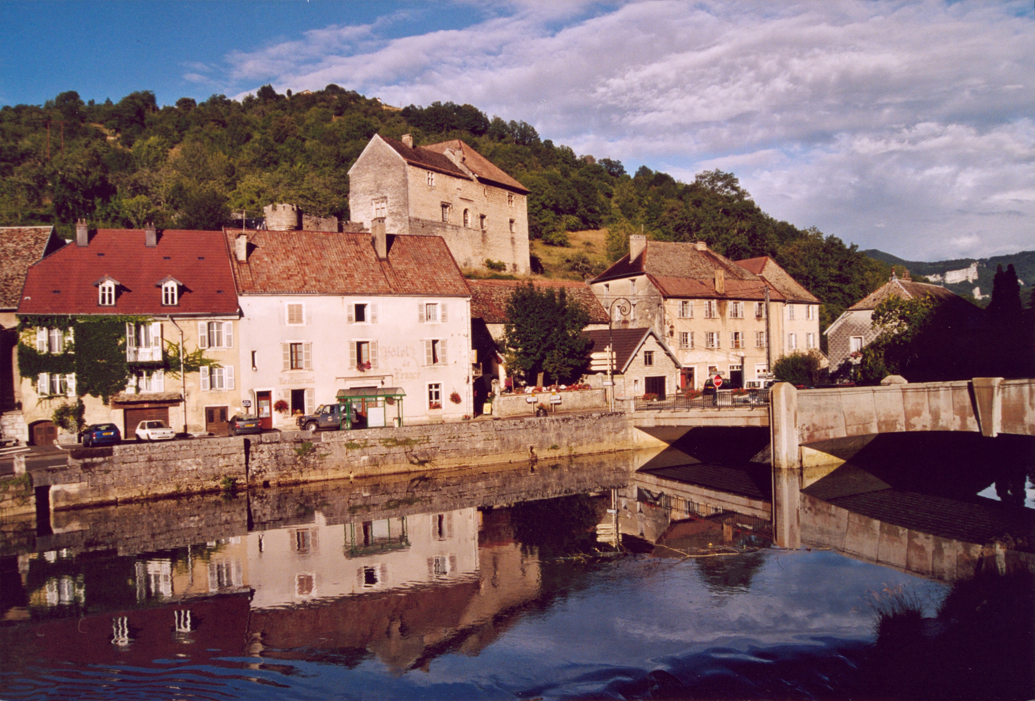 Lods, dans le Doubs, en France